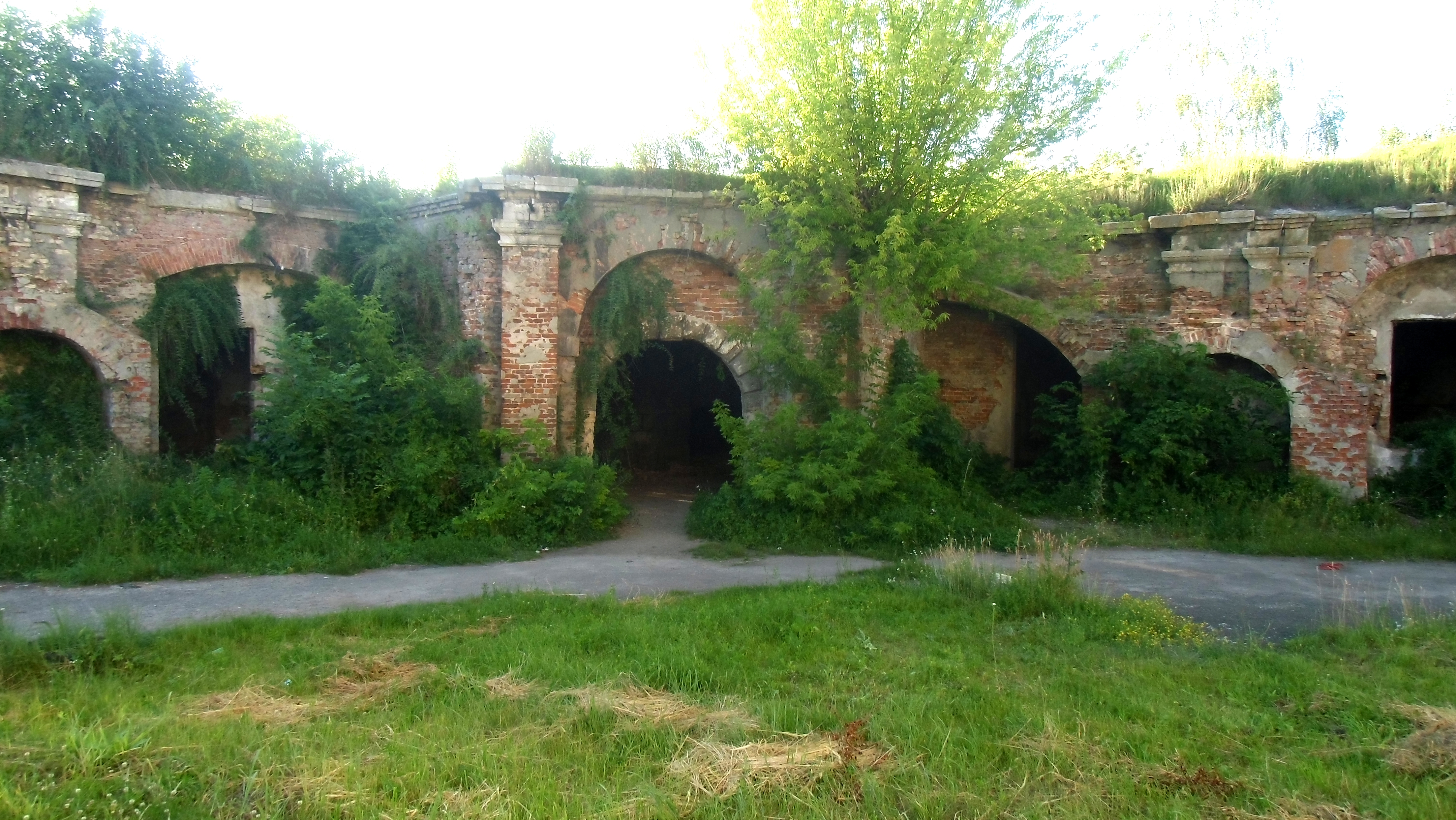 Brody, Lviv Oblast, Ukraine